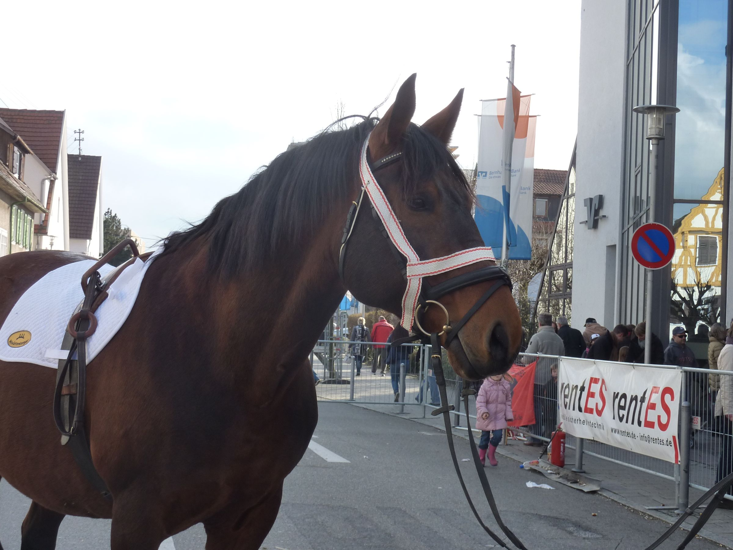 Altwürttemberger